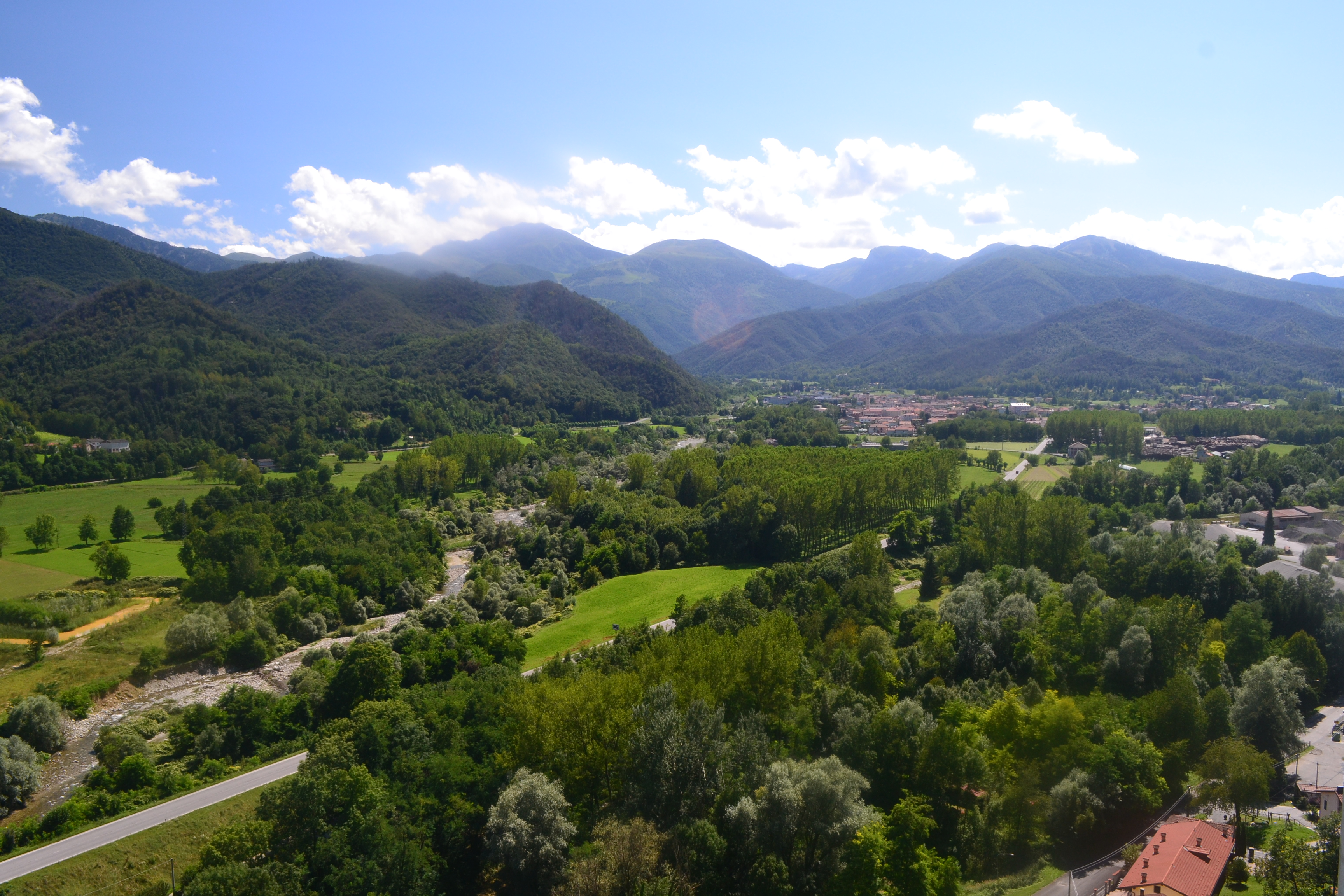 Santuario Santa Lucia Villanova Mondovì - Vista panorama